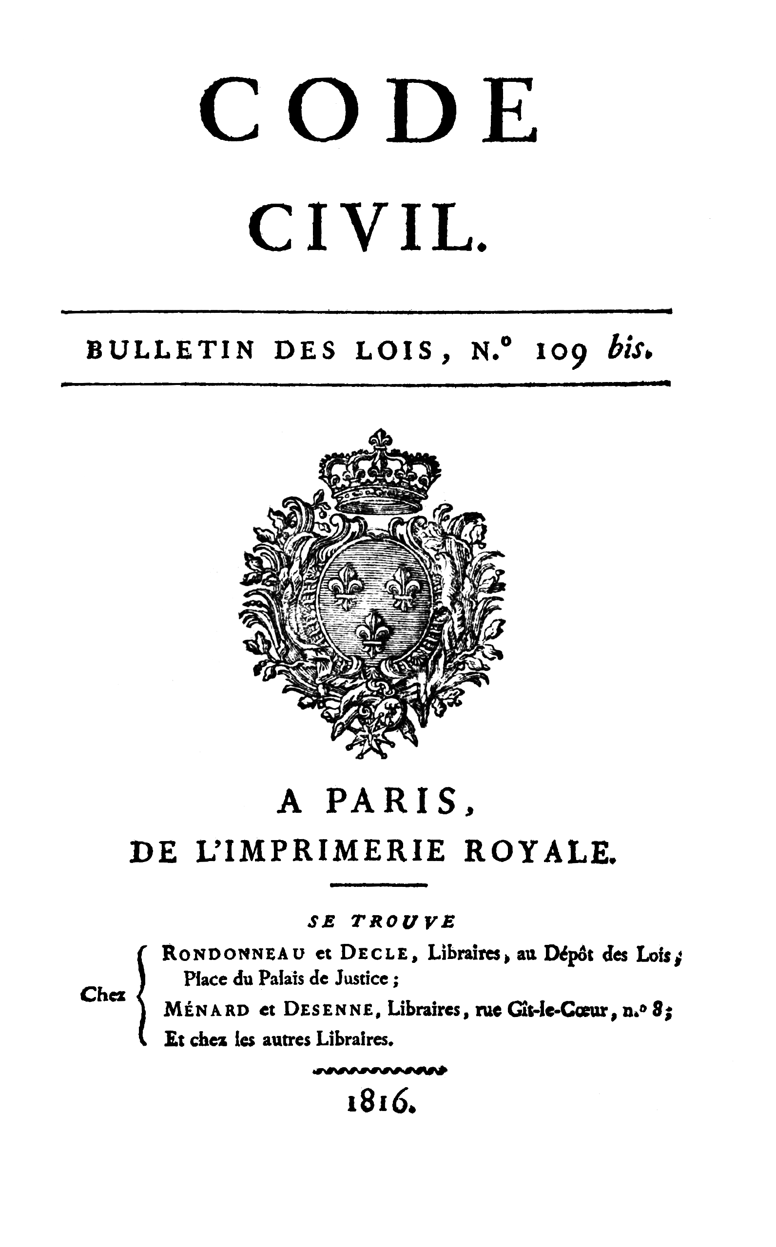 Титульный лист издания Кодекса Наполеона